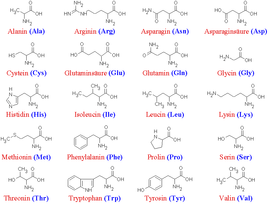 Strukturformeln der natürlichen Aminosäuren